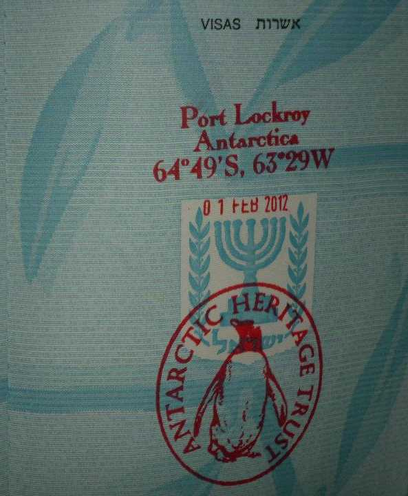 חתימה של תחנת פורט לוקרוי, אנטארקטיקה, בדרכון ישראלי